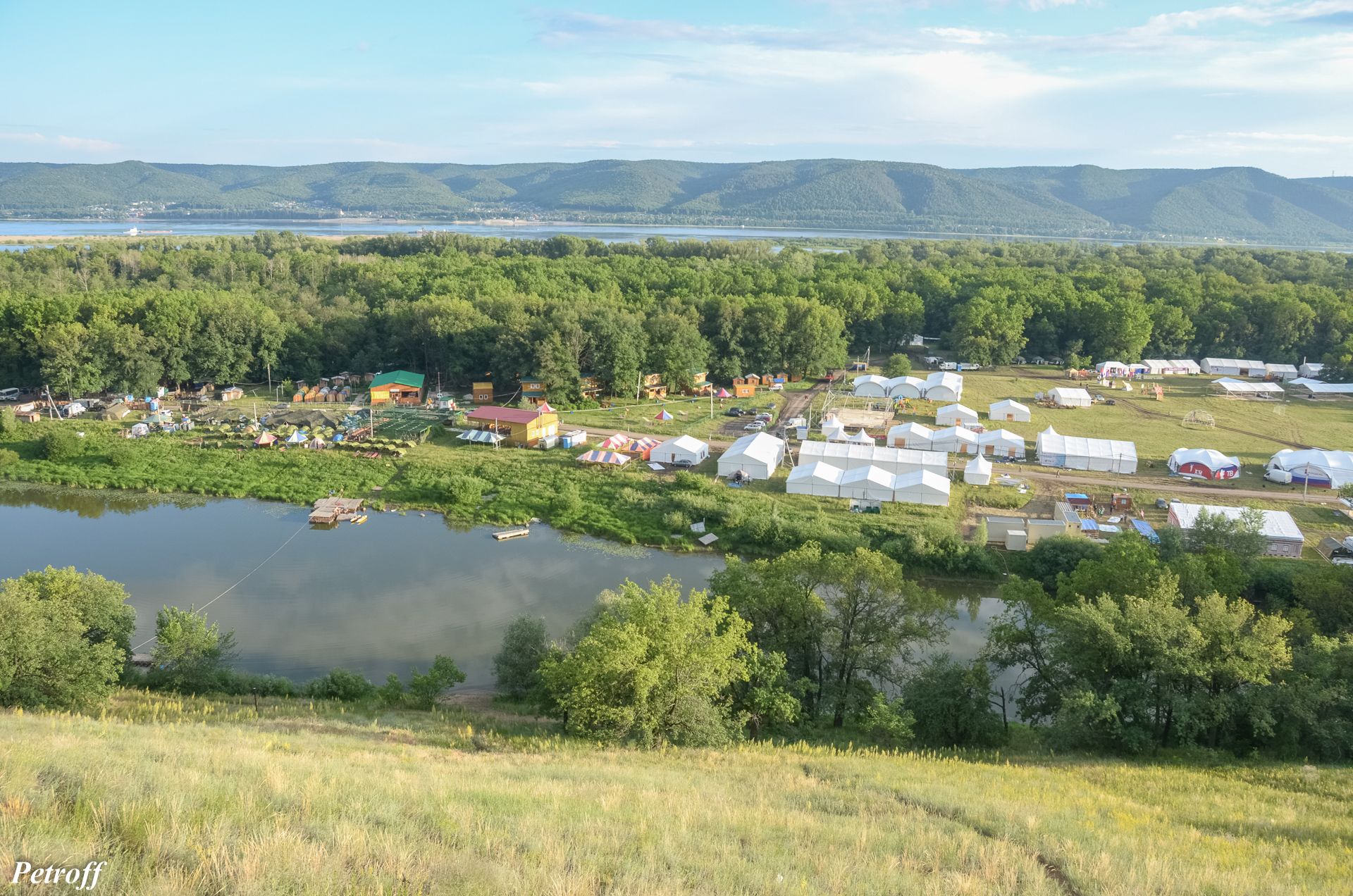 Мастрюковские озёра, фестивальная поляна. This image is related to the protected area of Russia number 6311450